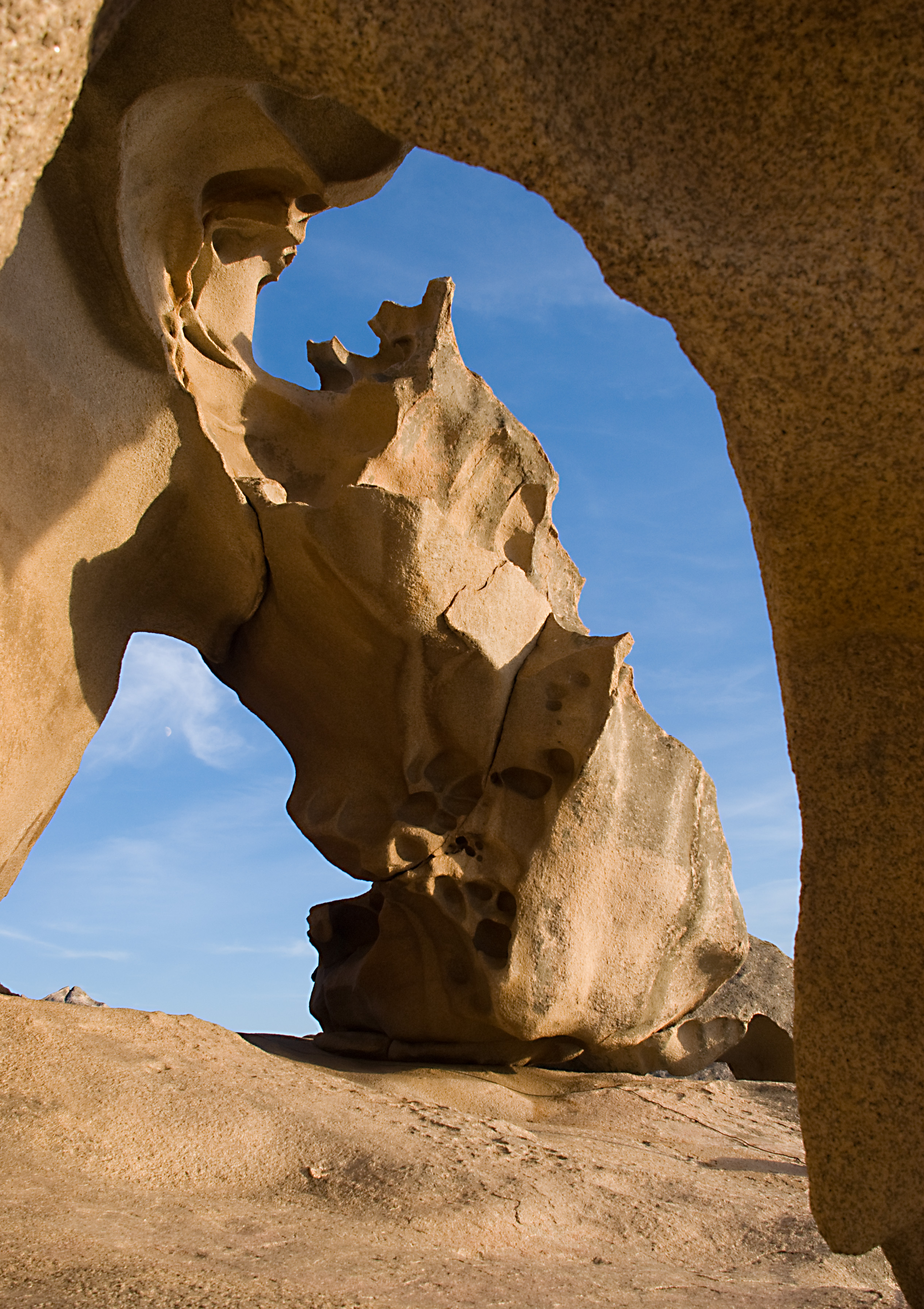 Capo d'Orso, near Palau, Sardegna, Italy